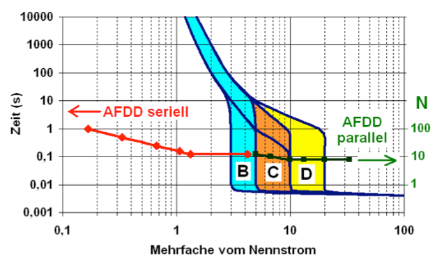 Auslösecharakteristik eines Arc Fault Detection Devices